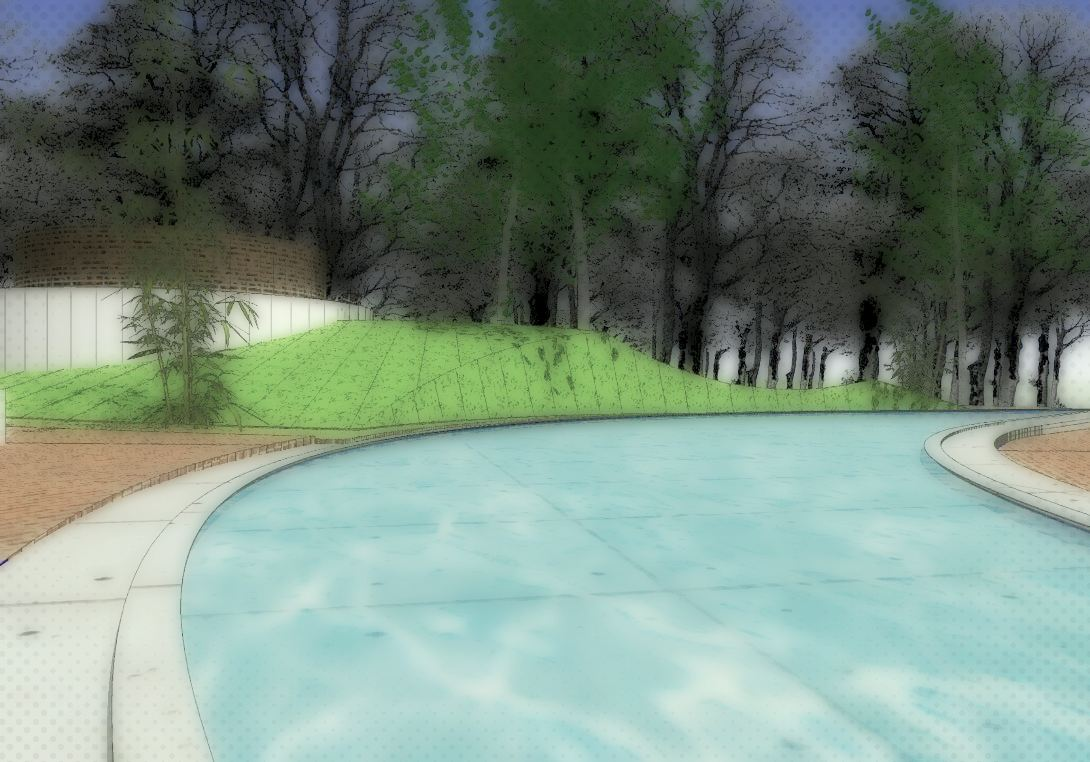 Dibujo del proyecto original 2002 (Neus Solé, Daniel Navas)